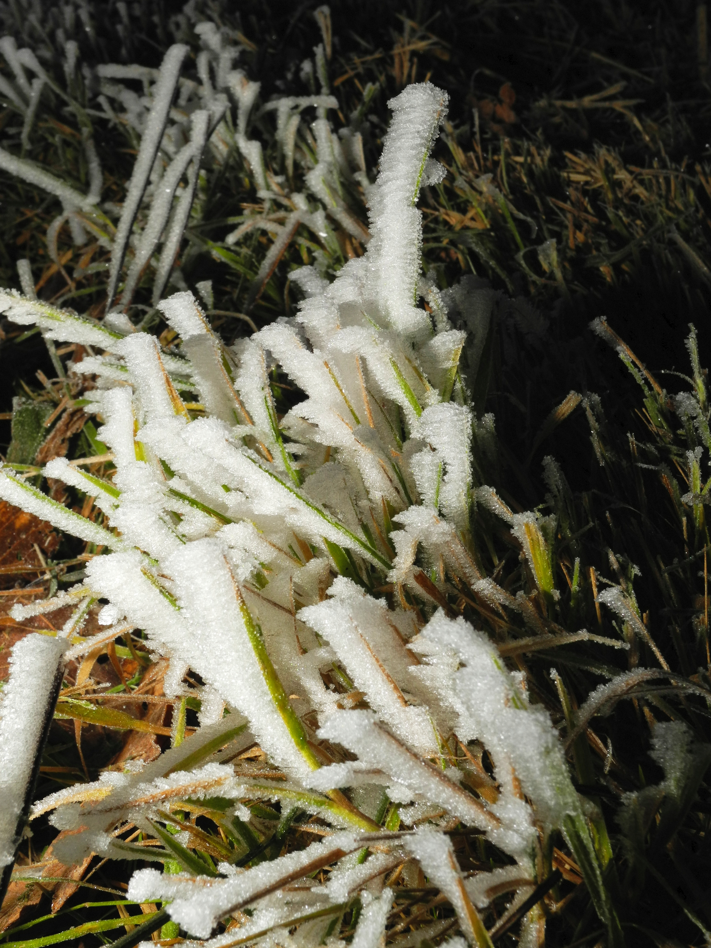 Givre sur de l'herbe.